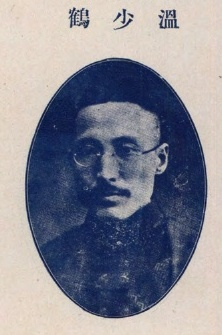 中文（中国大陆）: 重慶市私立孤兒院董事肖像